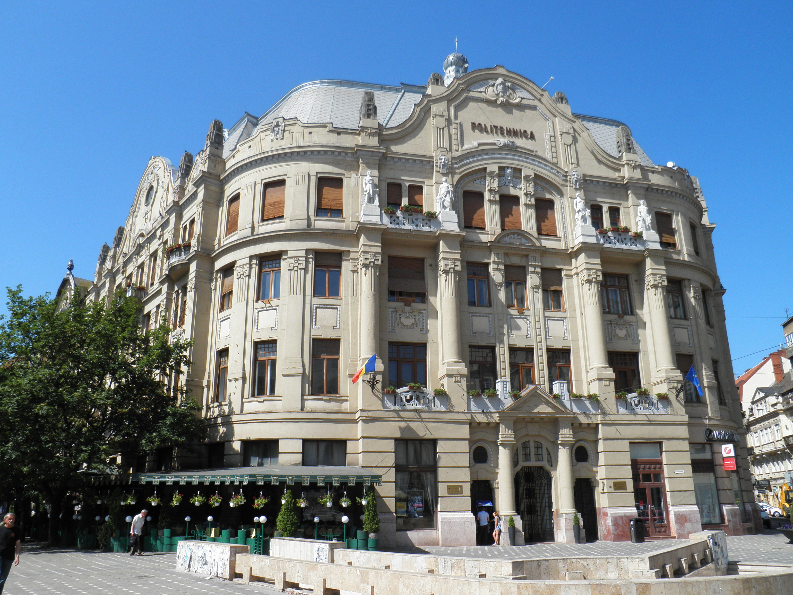 Piata Victoriei